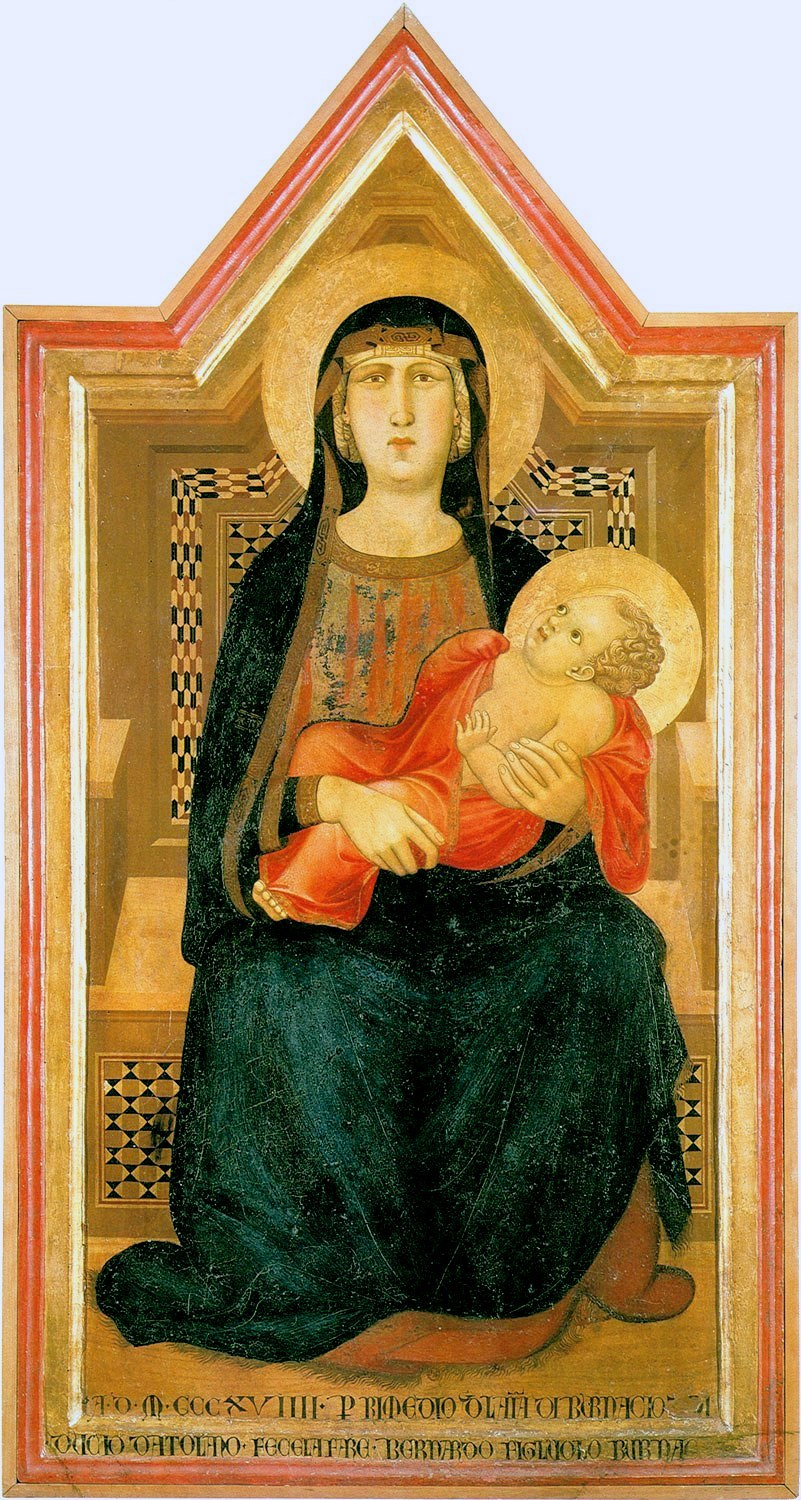 Lorenzetti Amb.presentation detail.jpg